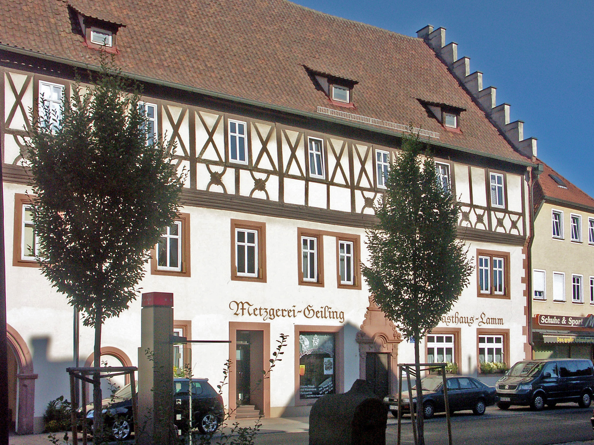 Historischer Gasthof Goldenes Lamm in Euerdorf